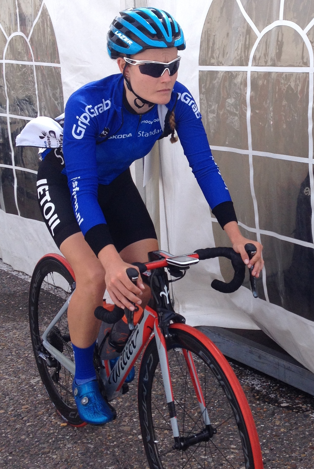 Wegwedstrijd voor vrouwen elite tijdens de Europese kampioenschappen wielrennen in Alkmaar op zaterdag 10 augustus 2019.